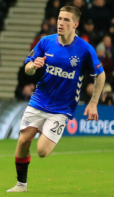 Первый матч Рианчо у руля «Спартака» завершился вничью. Репортаж из Глазго